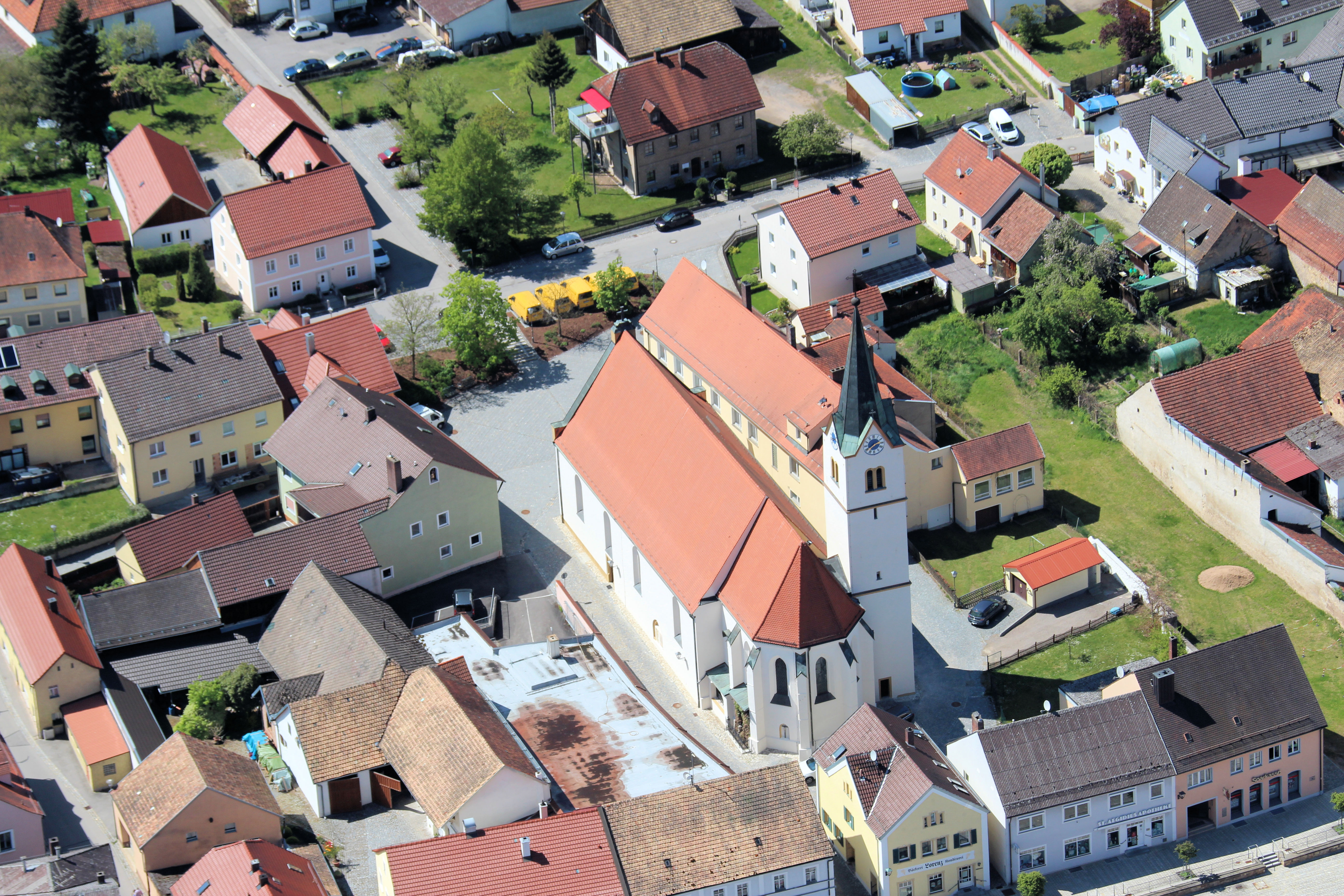 Pfarrkirche St. Ägidius, Bruck in der Oberpfalz, Landkreis Schwandorf, Oberpfalz, Bayern: Im Jahre 1140 weihte der Bamberger Bischof Egibert die katholische Pfarrkirche St. Ägidius. Die Anlage ist im Kern gotisch mit Sakristei, Ostchor und Turm. Nach der Zerstörung im 30-jährigen Krieg baute man das Langhaus und das Gewölbe neu auf. Die Inneneinrichtung ist im barocken und klassizistischen Stil ausgeführt. 1855/56 wurde das Gotteshaus nach Westen erweitert. 1889 erhöhte man den Turm auf 36m (Quelle: Hinweistafel an der Kirche)